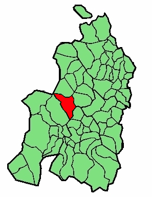 aipaturiko udalerriaren kokapena Nafarroa Beherean